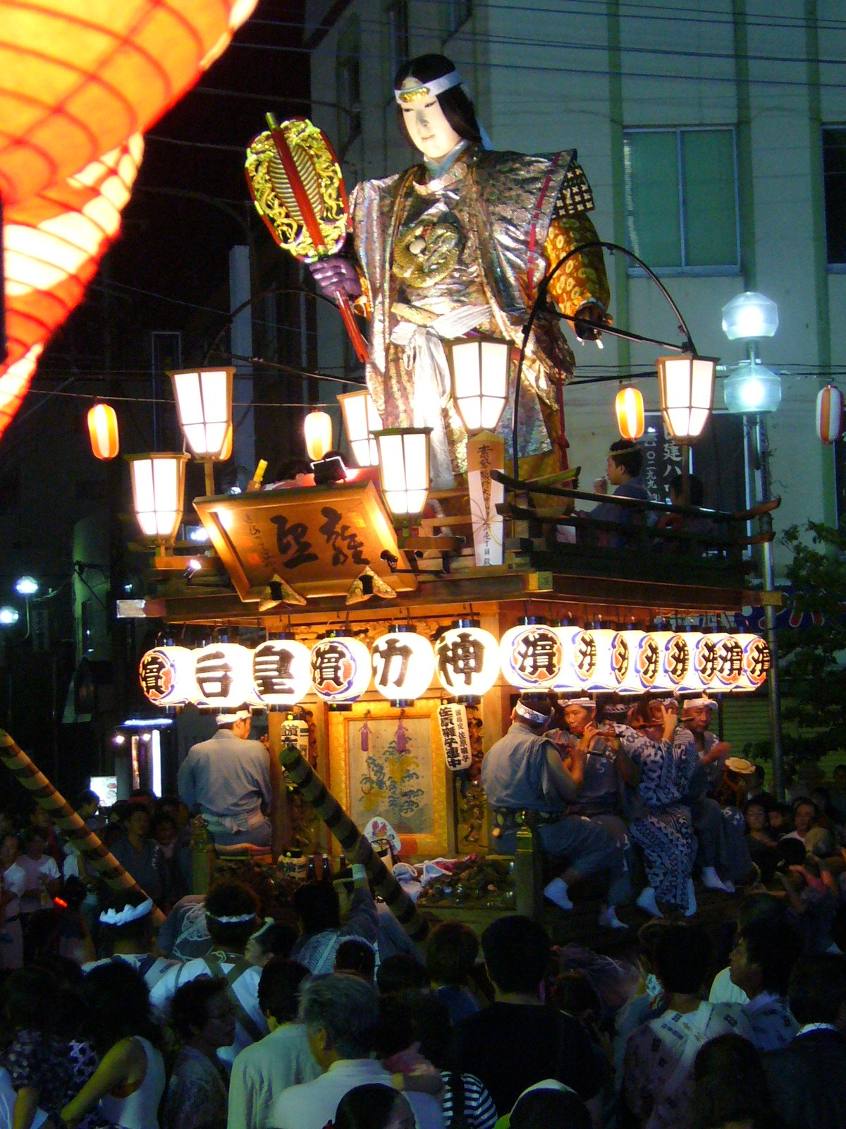 hamacyo,itako-gion-festival,itako-city,japan 潮来祇園祭礼、濱壹町目の山車、神功皇后。旧佐原本宿本町の山車。